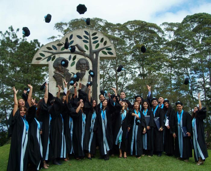 Graduandos